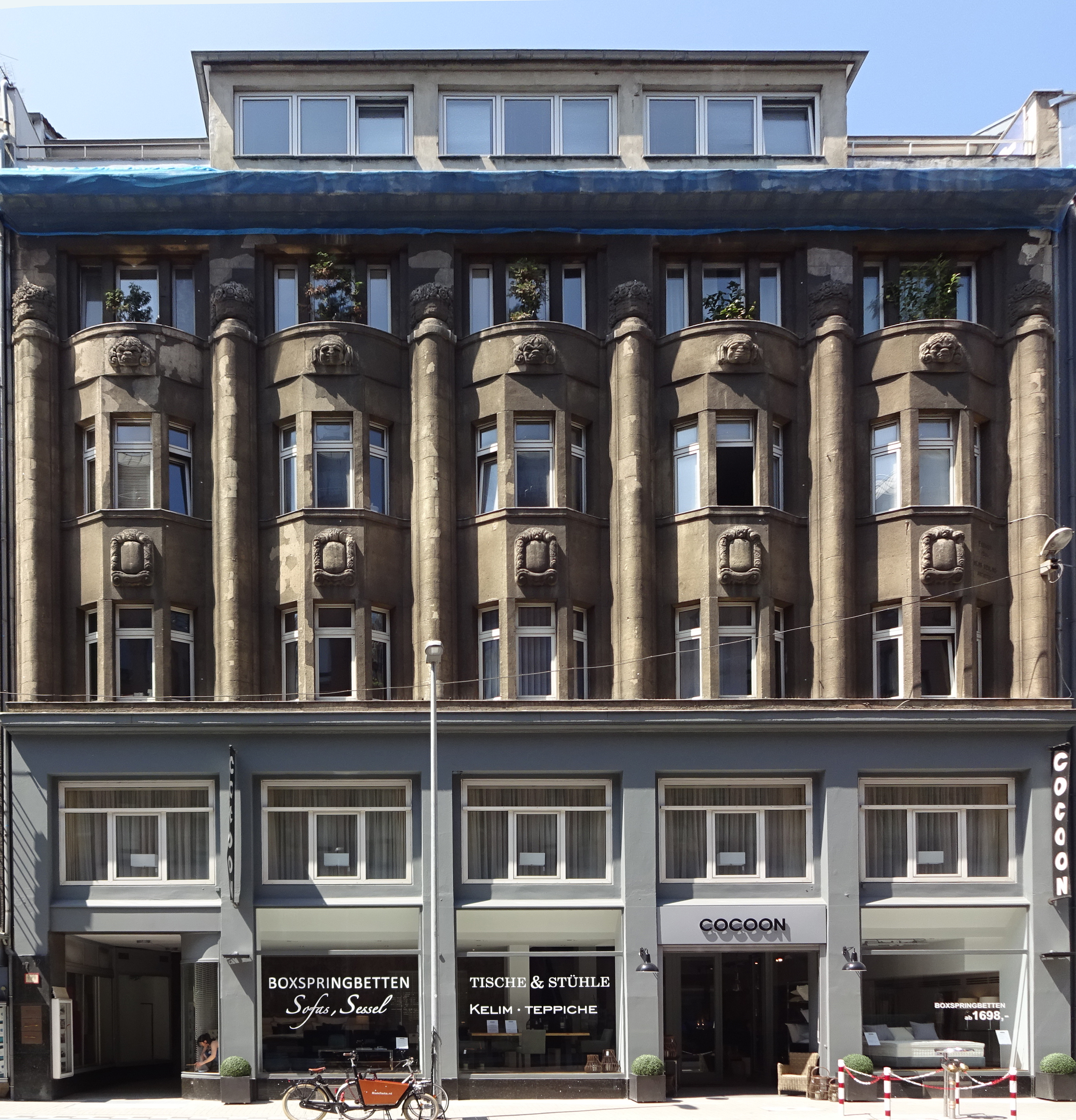 Haus Kasernenstraße 17-19, Eingang Ladenlokal Möbelgeschäft Nr. 17, Düsseldorf-Carlstadt